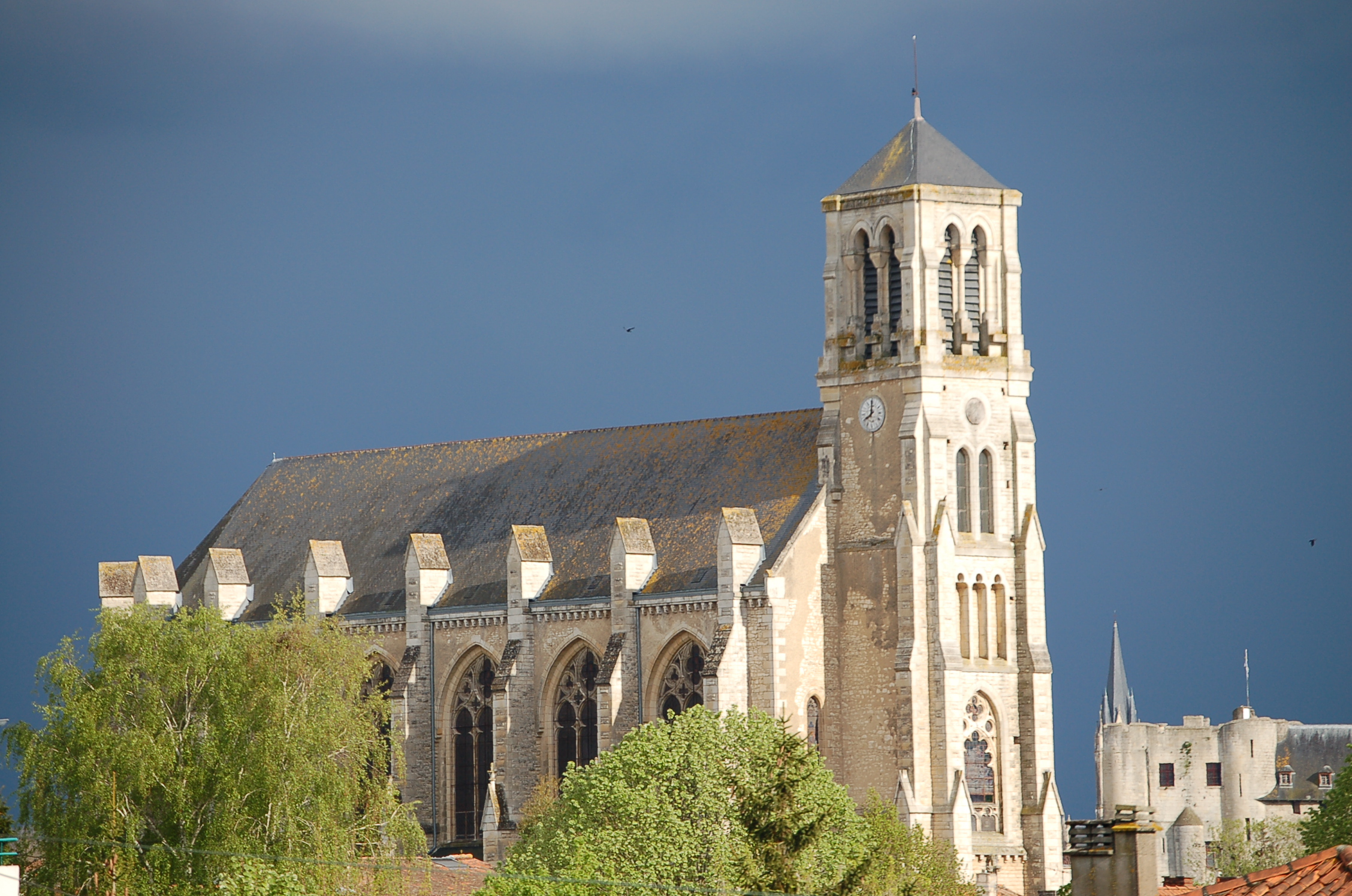 Église St-Etienne, à Niort (Deux-Sèvres)